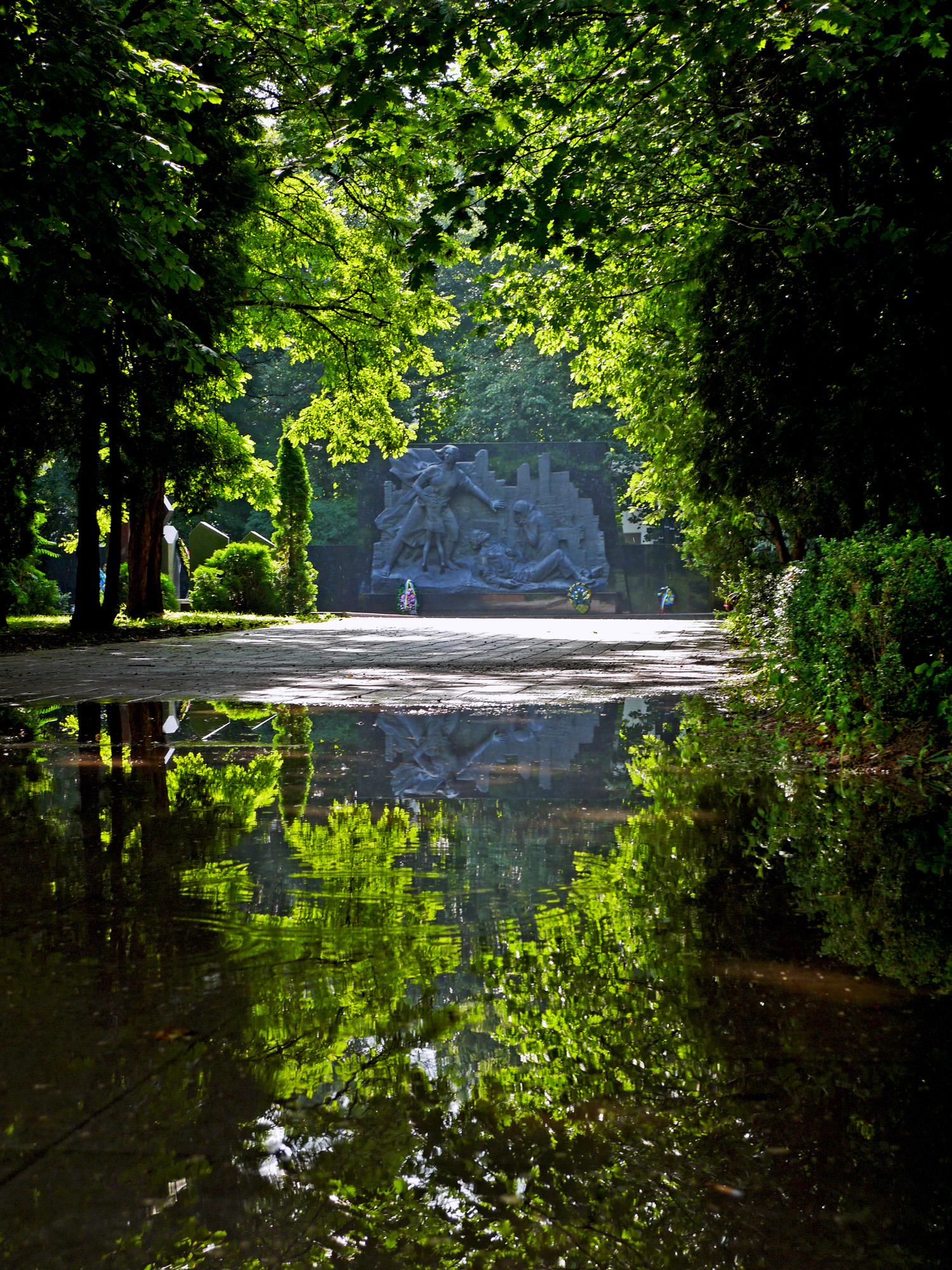 «Меморіал», м. Луцьк